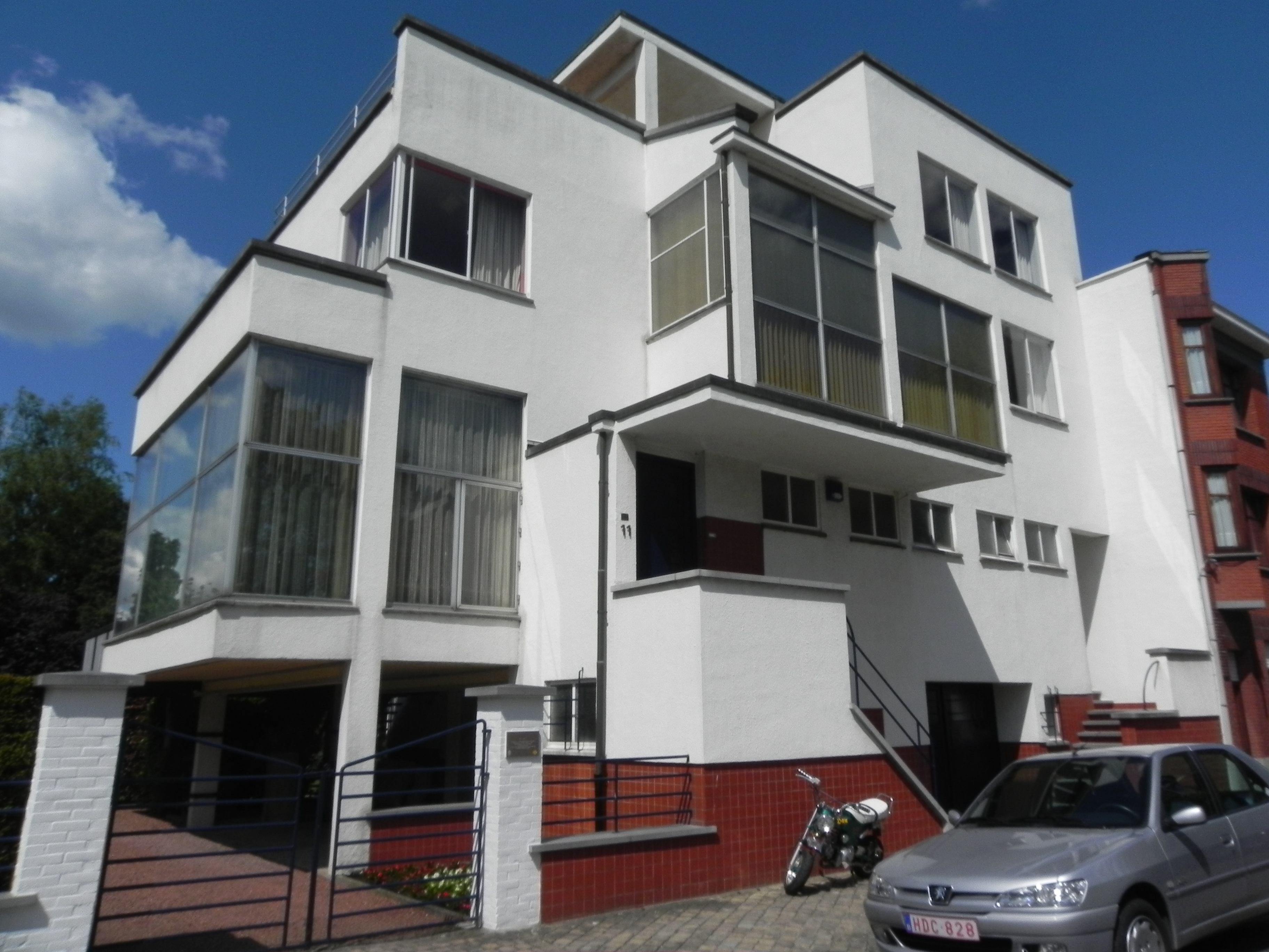 voorgevel woonhuis